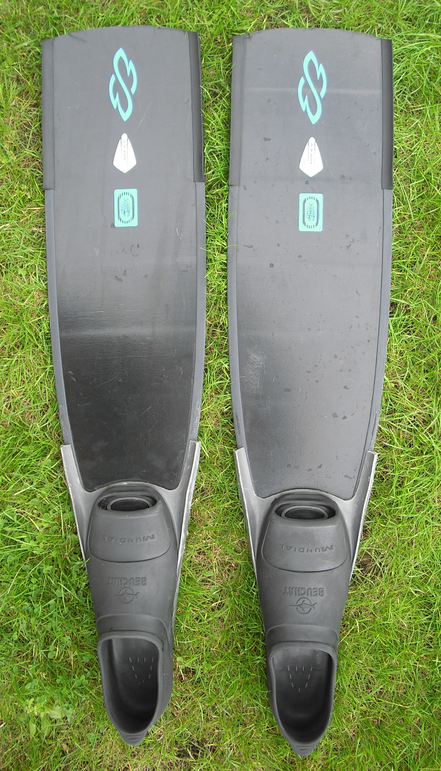 Palmes de chasse sous-marine et apnée en fibre de verre, de marque Breier